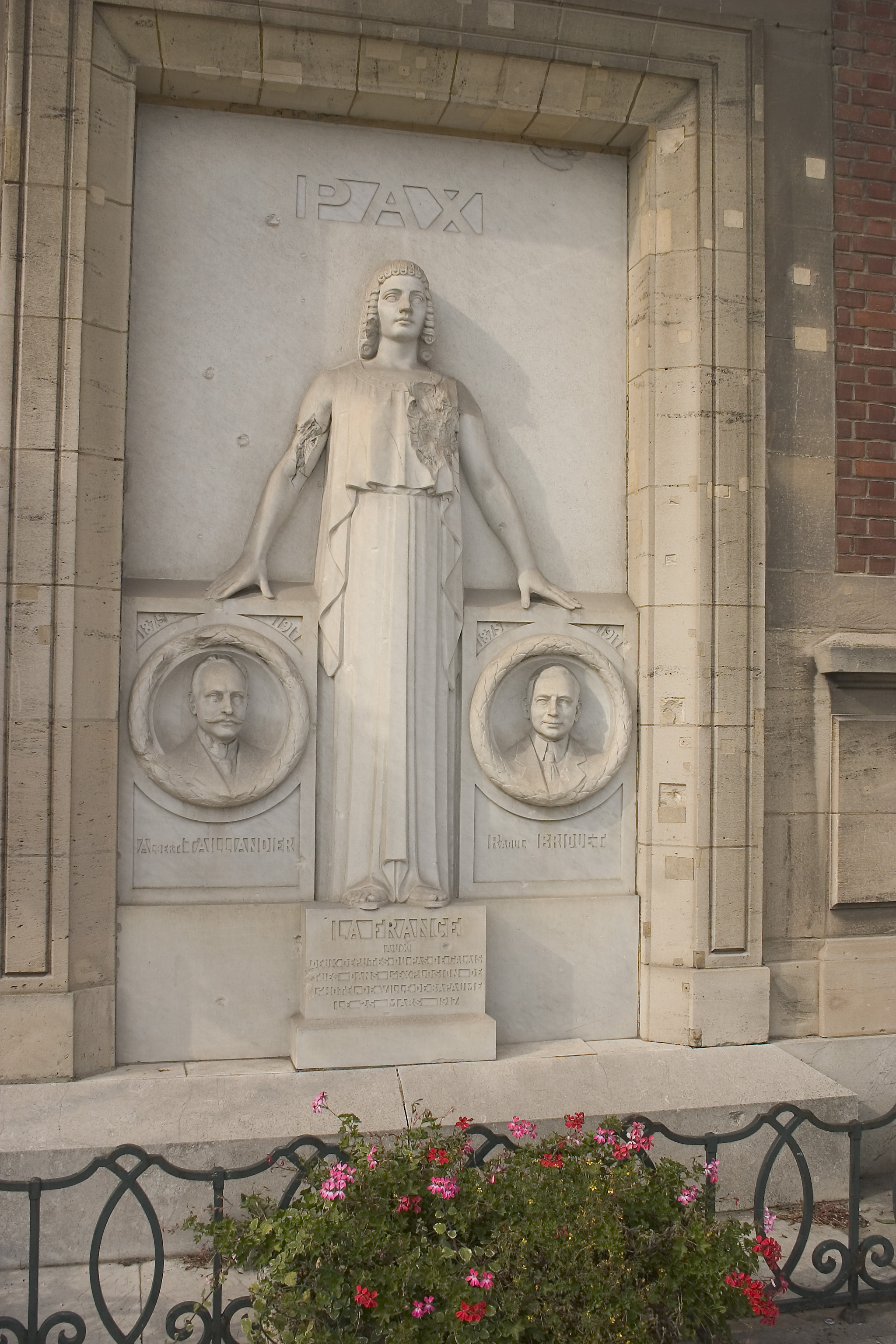 Bapaume le monument du Briquet et Taillandier